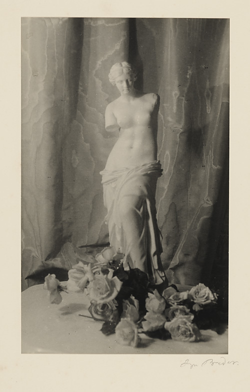 Breder, Inga ca 1930 Stilleben, "Venus fra Milo". Tildelt 1ste premie sommerkonkurransen 1930 gruppe III Klasse II. utstillt Oslo Kameraklubbs jubileumsutstilling mars 1931 på Blomquist. 21,3 x 13,3 cm Sølvgelatin NMFF_000802